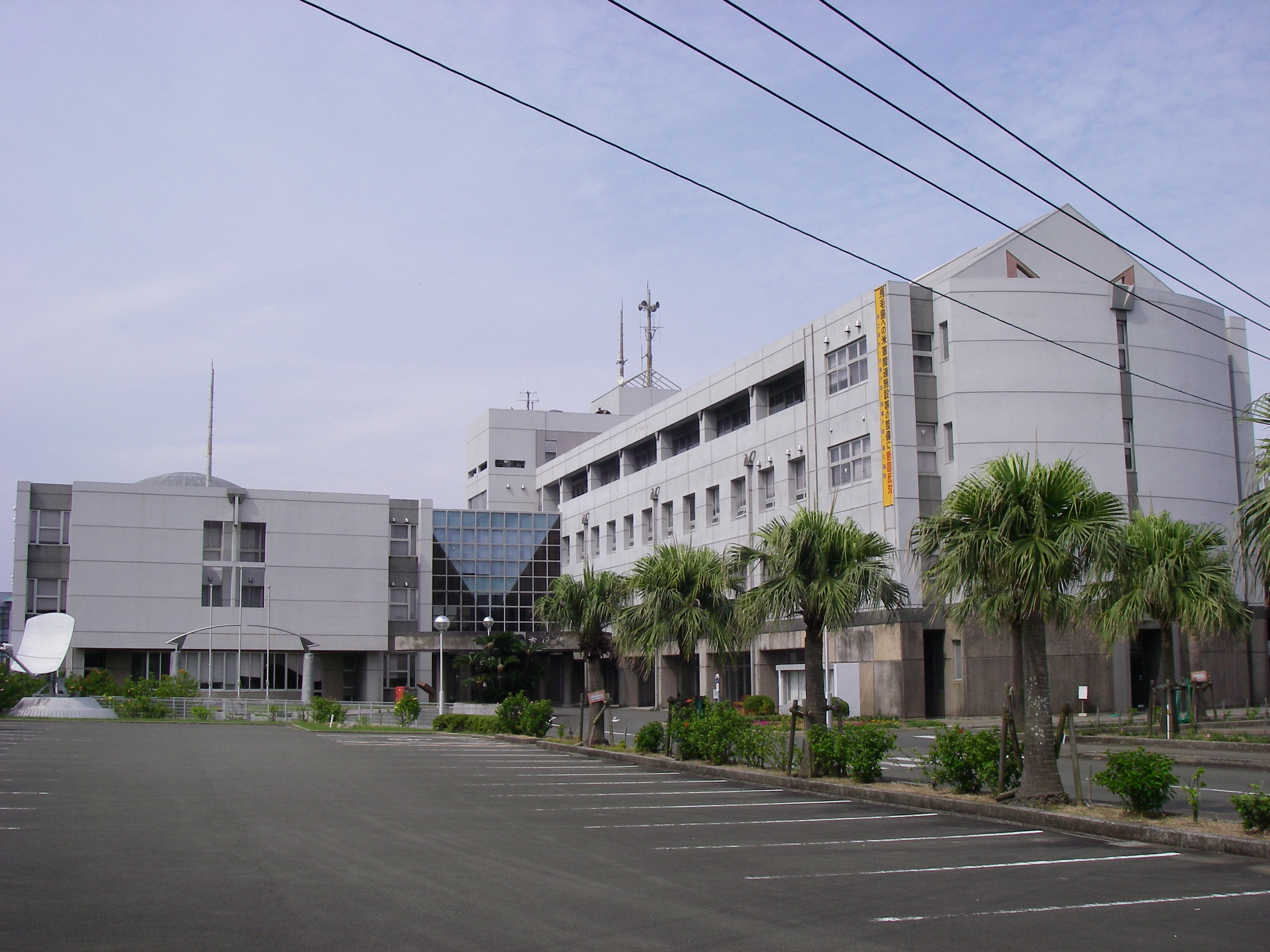 西之表市役所